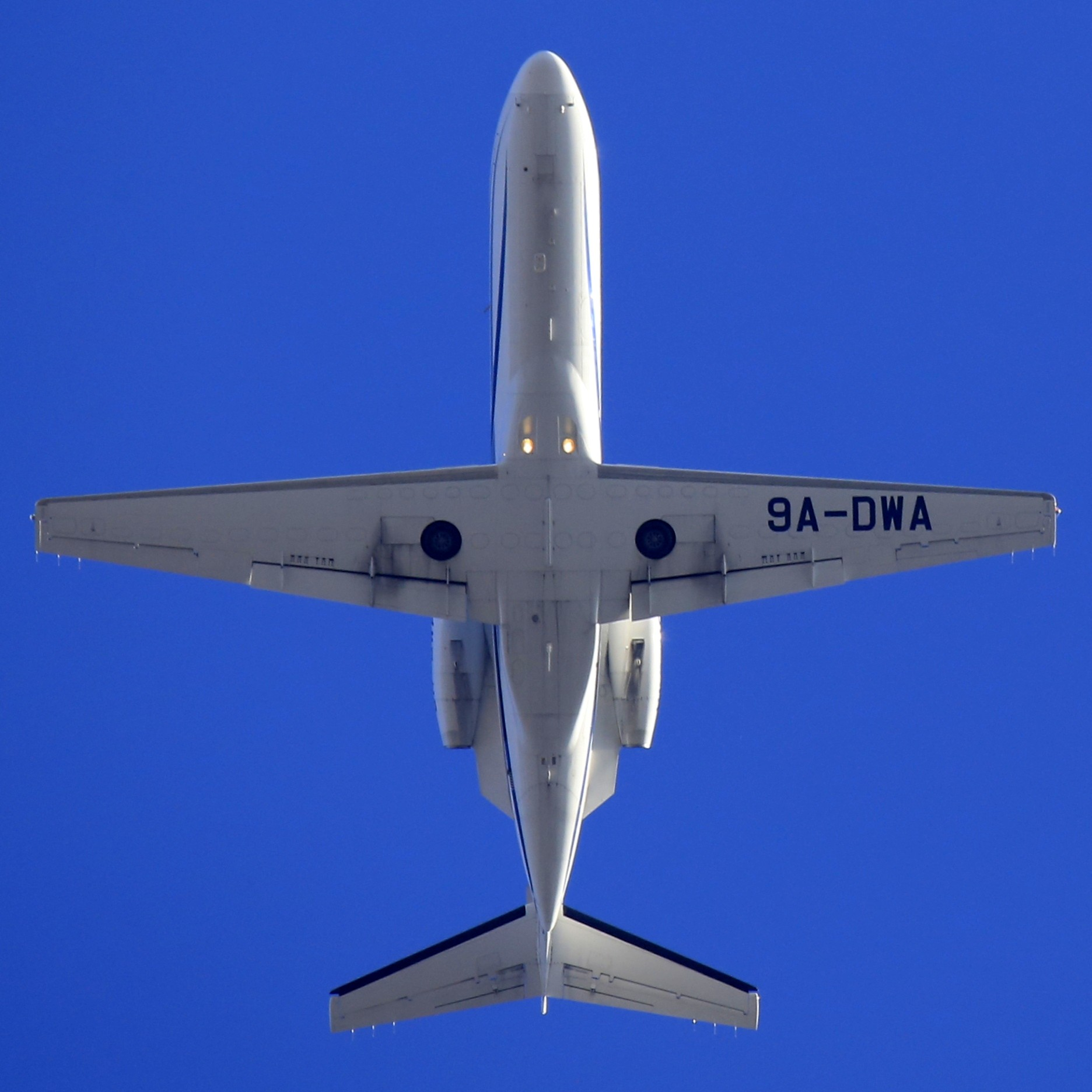 Cessna 525A CitationJet CJ2+